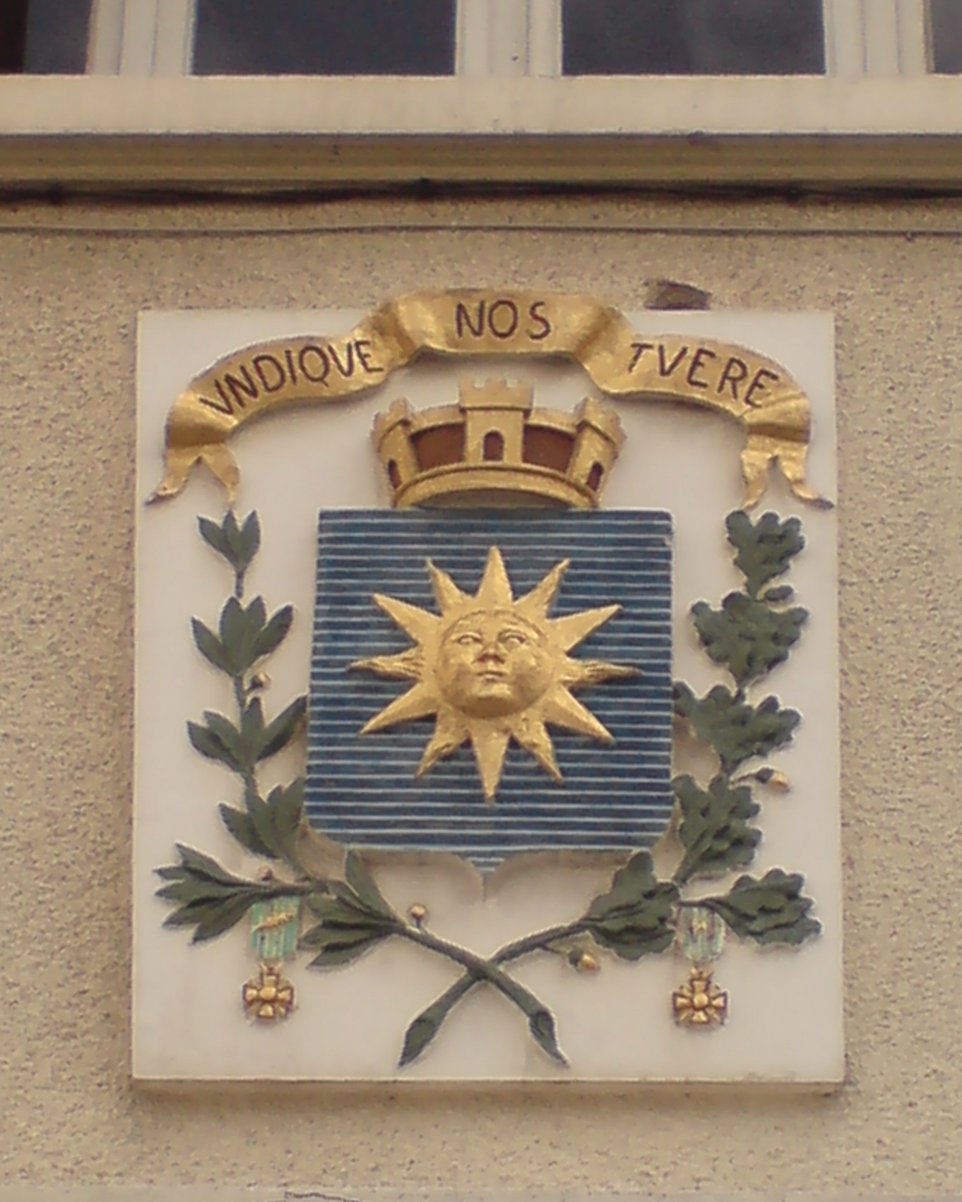 Blason de Lure